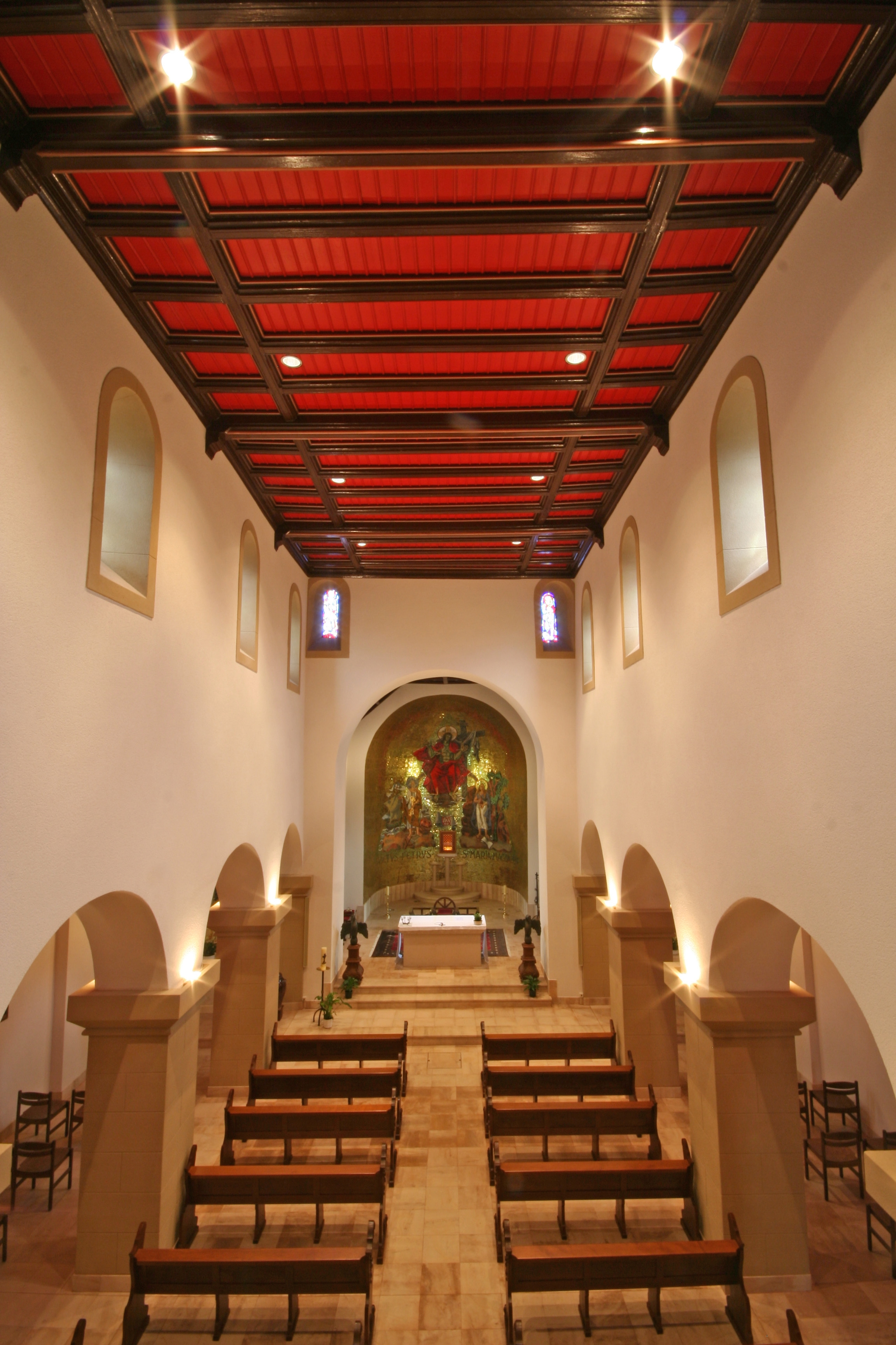 Basilika Lenneng bannen